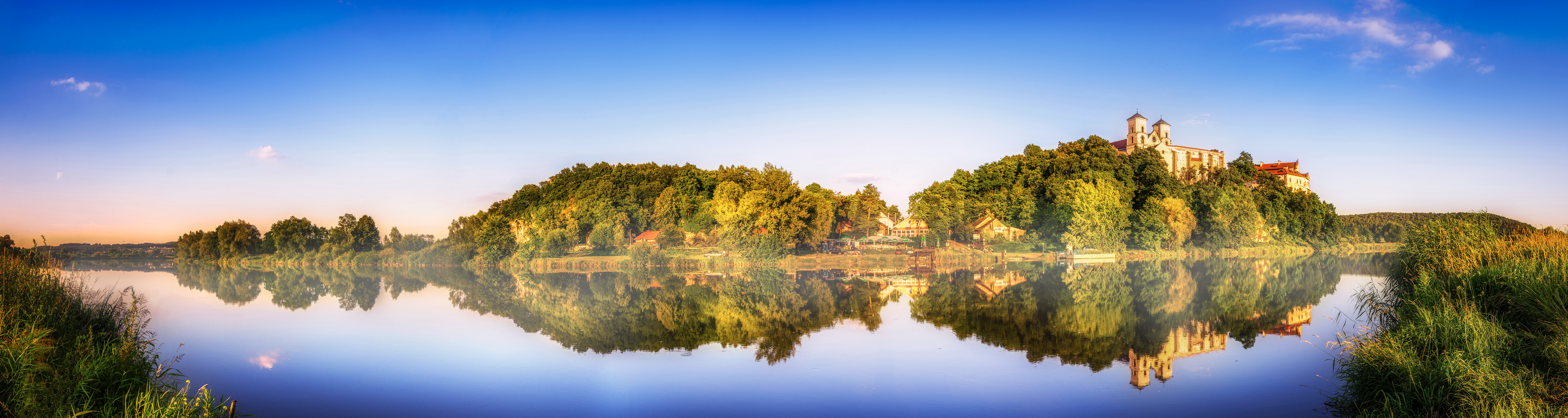 Park krajobrazowy Bielańsko-Tyniecki Park Krajobrazowy.